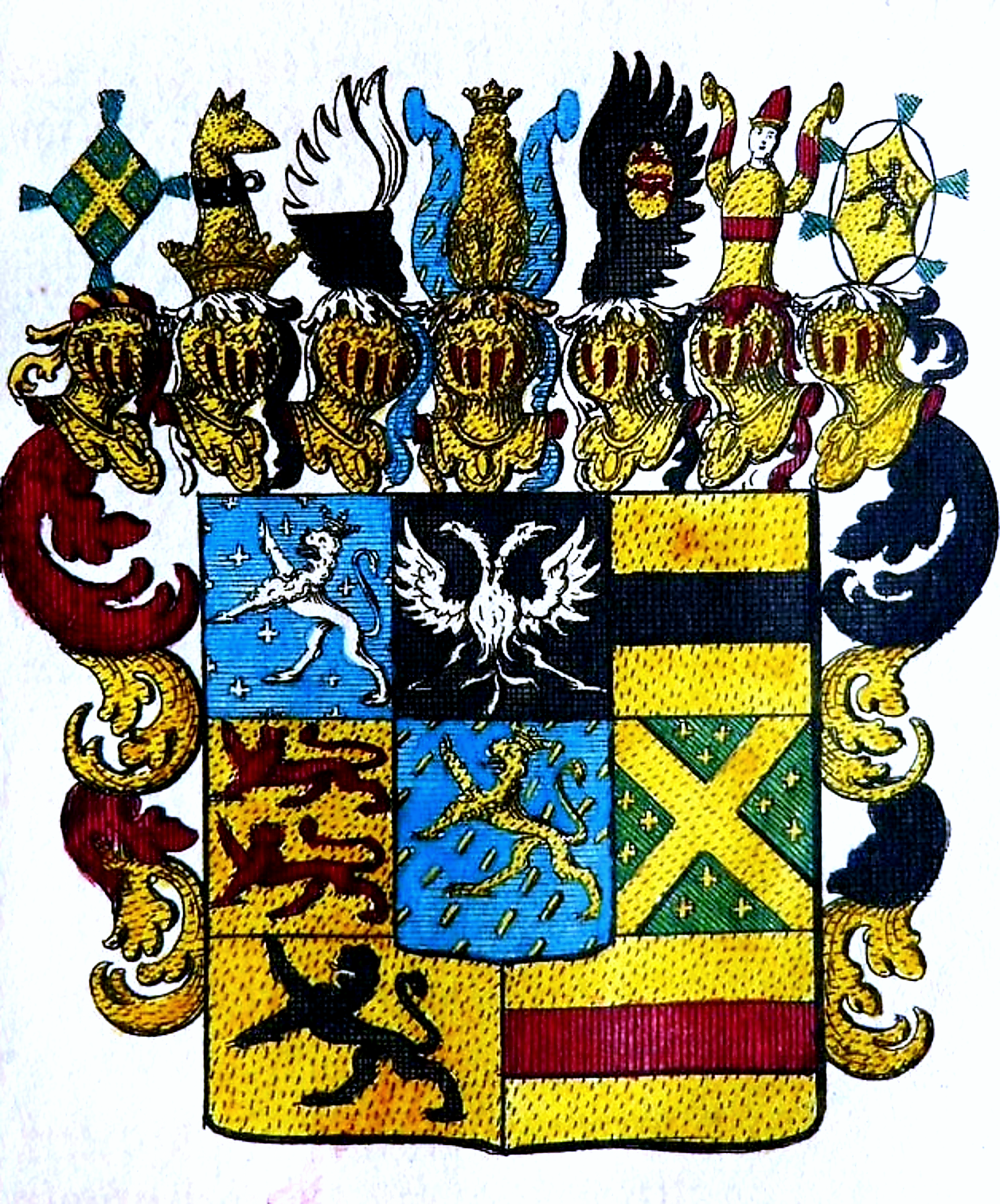 „Wapen der Fürsten zu Nassau von der älteren Linie.“ (Walramsche Linie): Nassau-Saarbrücken, N.-Weilburg, N.-Usingen, N.-Idstein.